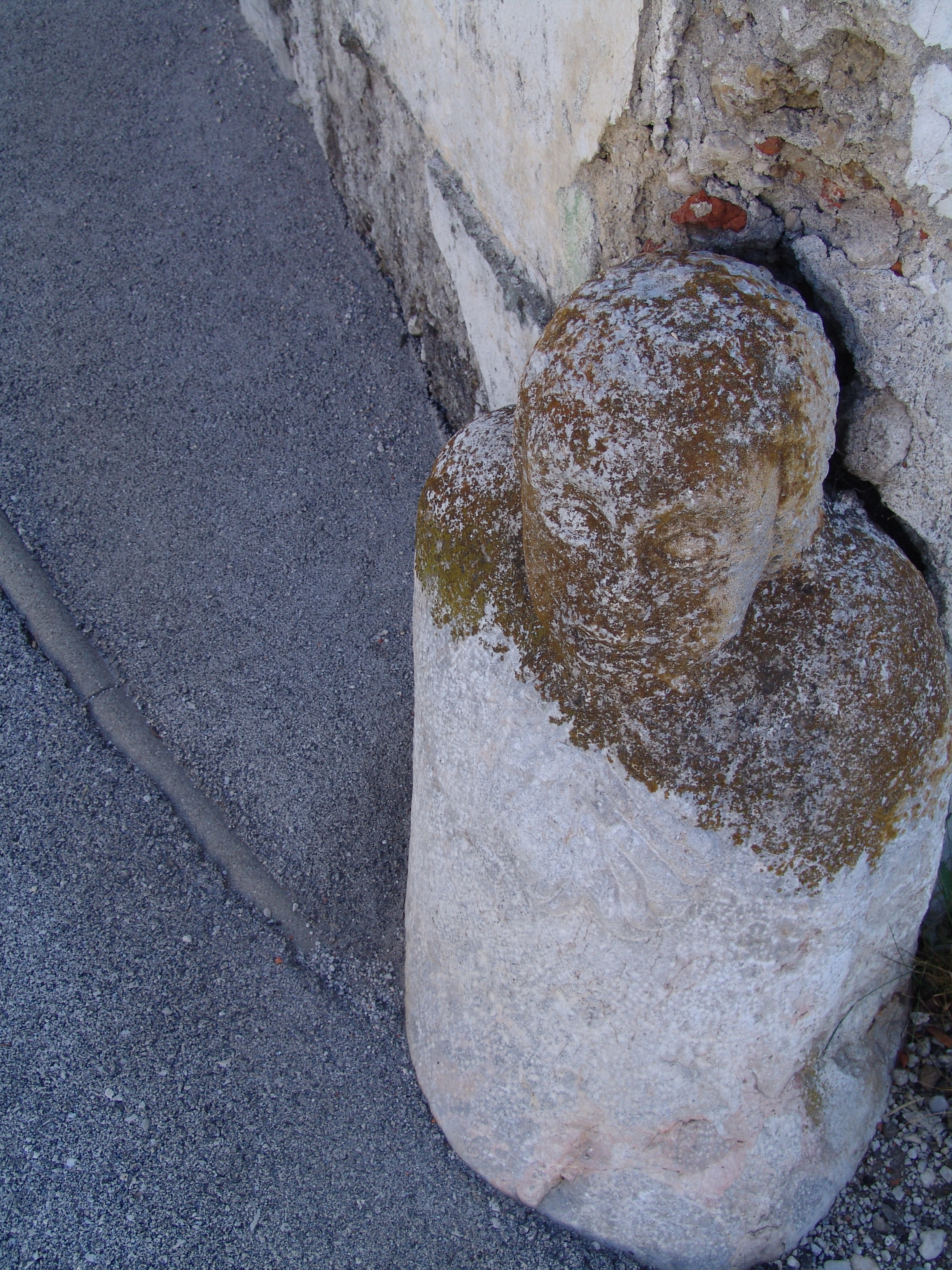 Kipec pri Novakovi hiši